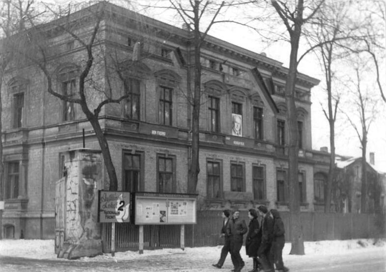 Langenweddingen, Blick auf das Kulturhaus ADN-ZB Rösener Ko-Schm 12.1.1951 Winterarbeit auf der MAS Langenweddingen bei Magdeburg Auf den Maschinenausleihstationen der Deutschen Demokratischen Republik werden neben den Winterarbeiten und der Schulung der Traktoristen bereits Vorkehrungen für die Frühjahrsbestellung getroffen. Die Traktoristen der MAS Langenweddingen im Bezirk Magdeburg sind eifrig dabei, ihre Traktoren für den Einsatz zu überprüfen und sich theoretisch und praktisch zu schulen. Außerdem entfallen sie eine rege Kulturarbeit im Dorfe. UBz: Das Kulturhaus der MAS hat einen neuen Saal erhalten und ist mit einer Lautsprecheranlage ausgestattet.